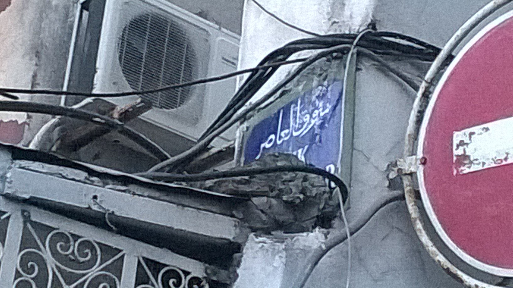 Sidi El Béchir , Tunis سيدي البشير ، تونس